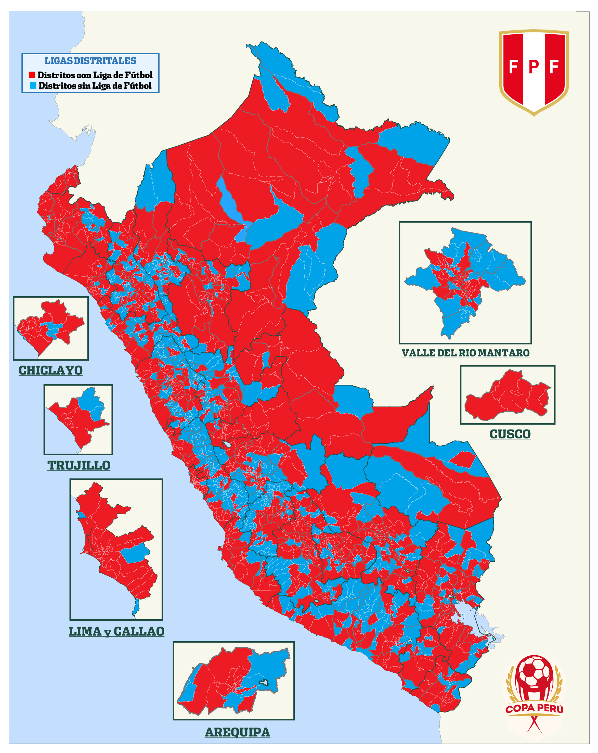 Mapa Distrital de Ligas activas de la Copa Perú (a enero 2017).